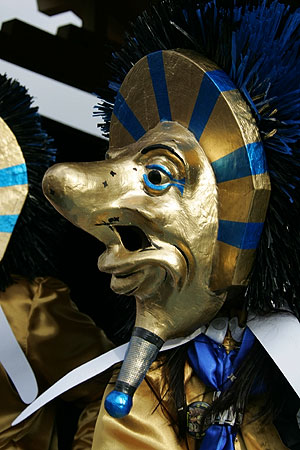 Basler Fasnacht 05: Waggis